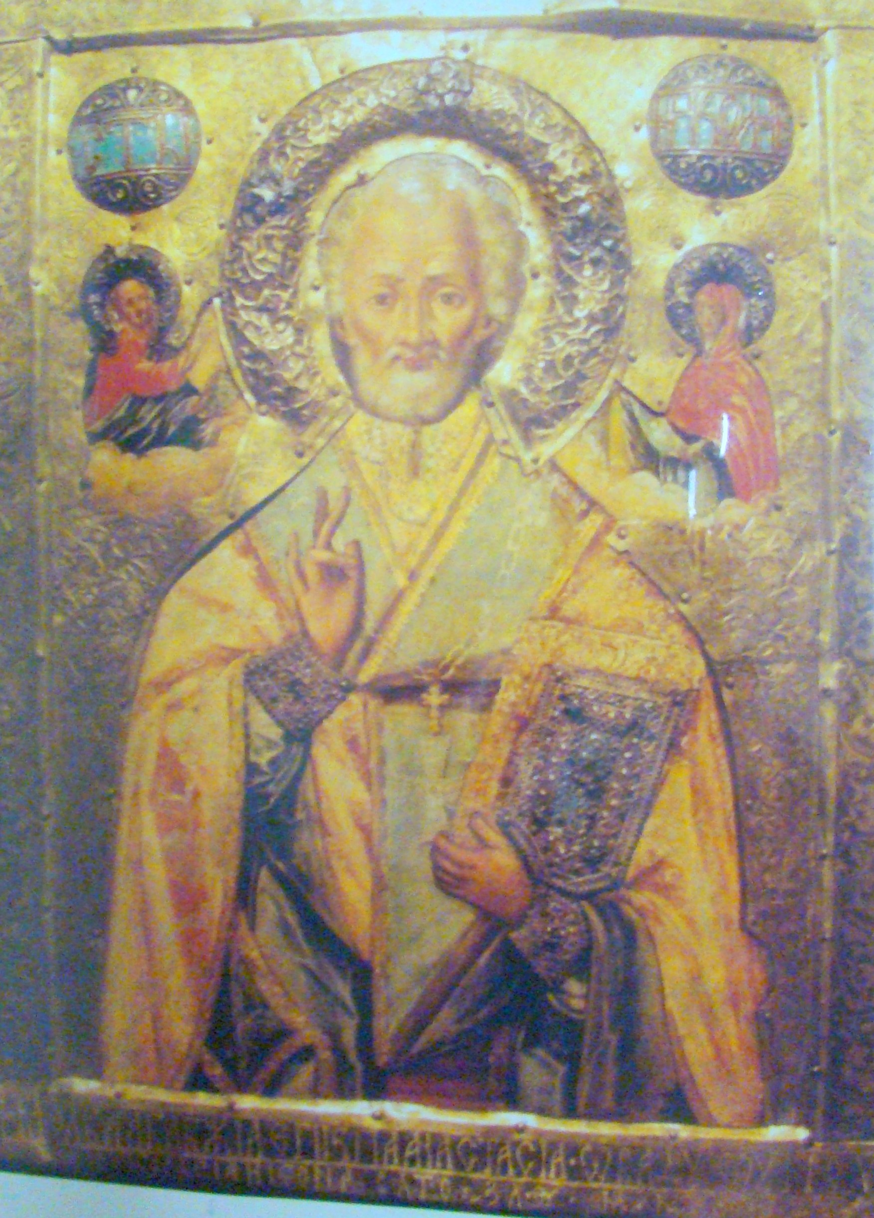 Biserica "Adormirea Maicii Domnului" a mănăstirii Vadului , sat Vad, județul Cluj